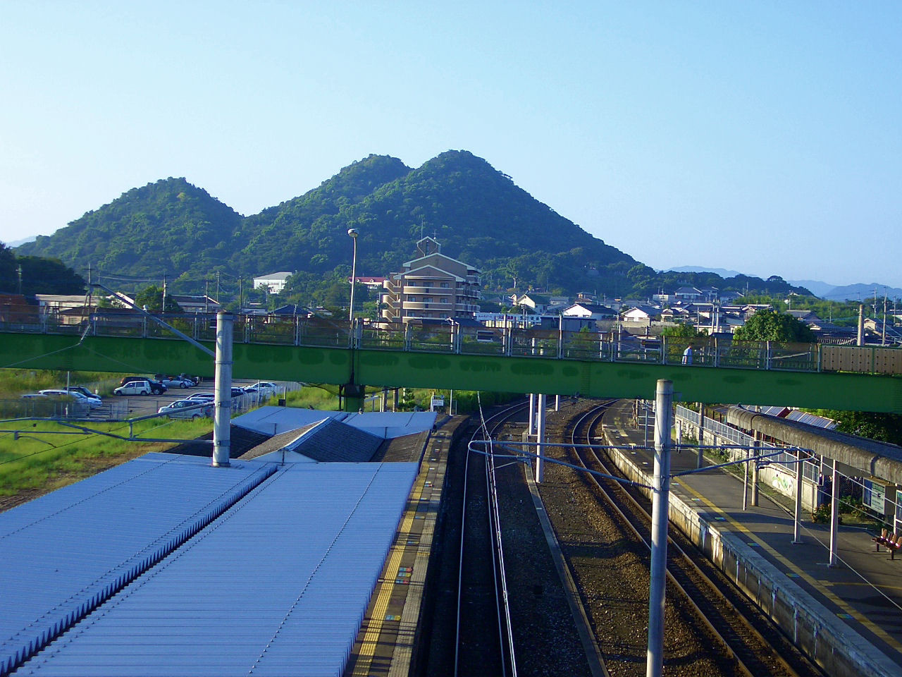 iizuka city, Fukuoka, Japan